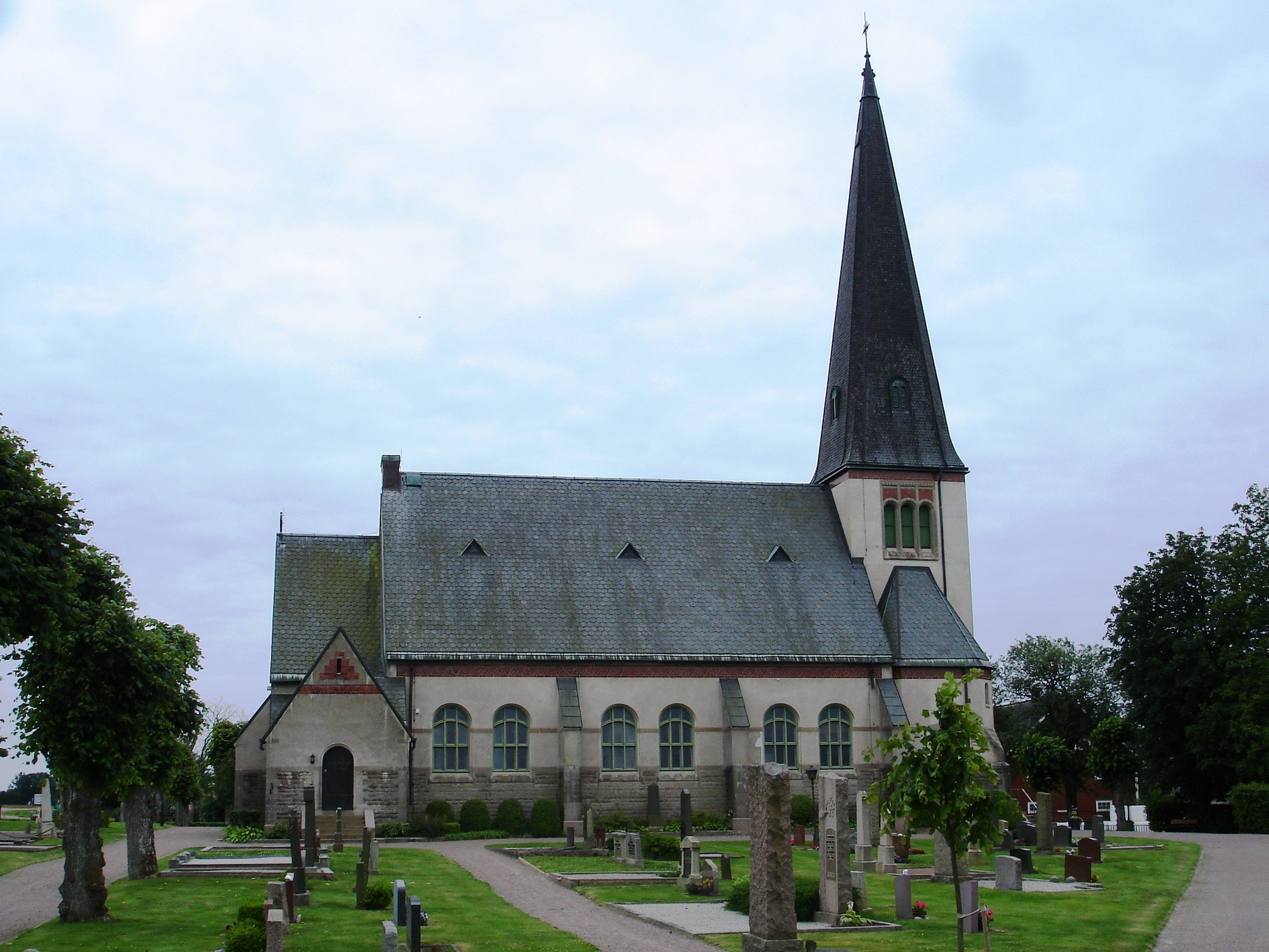 Tjärby kyrka i Laholms kommun i Hallands län